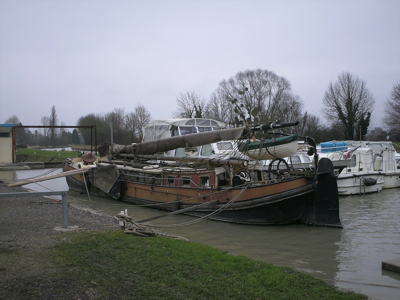 Port à La Chapelle-Montlinard 2008